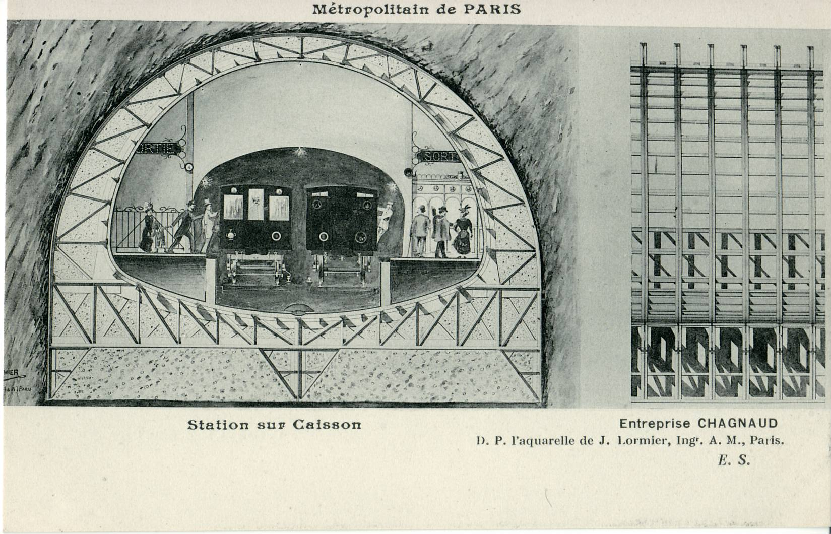 Carte postale ancienne éditée par Malcuit Métropolitain de Paris : coupe d'une station sur caisson (Publicité de l'Entreprise Chaignaud